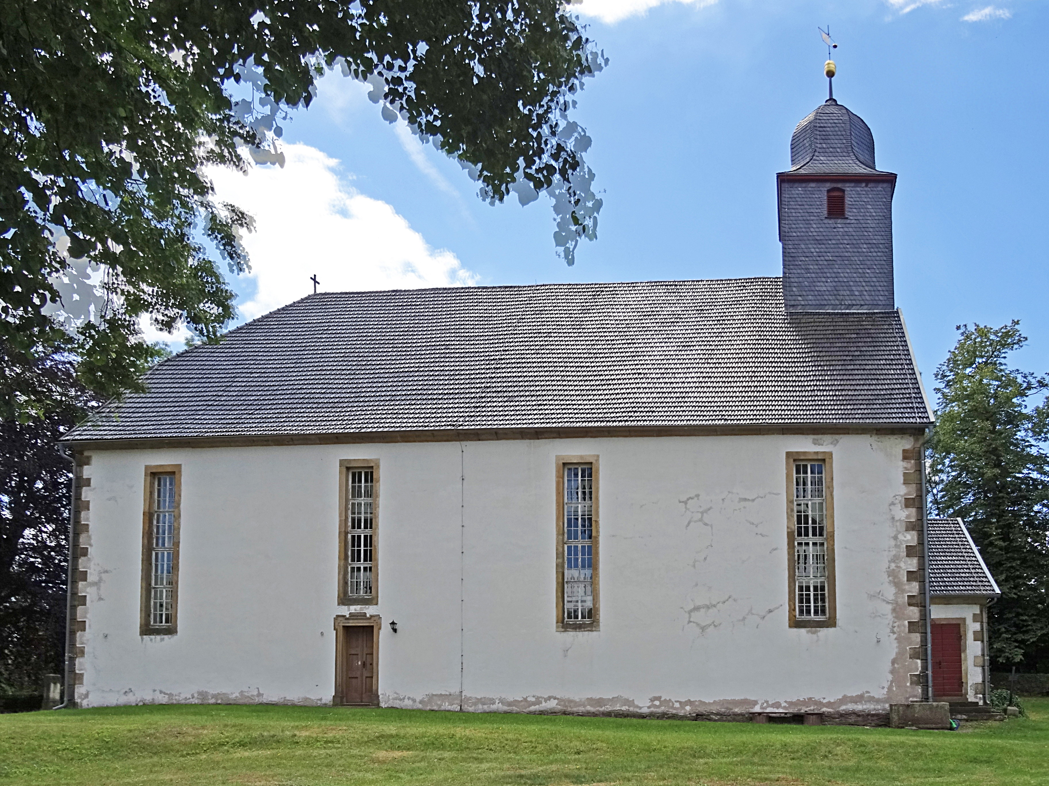 Pfarrkirche St. Immanuel in Altenbergen (Georgenthal)